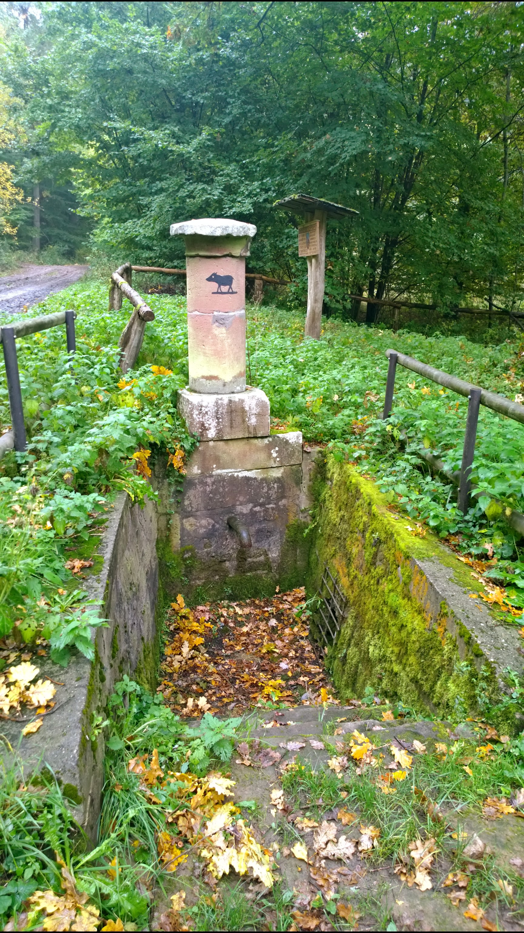 Naturdenkmal Sausteige Eiche und Quellbrunnen, Blick von Nordwesten zum ND